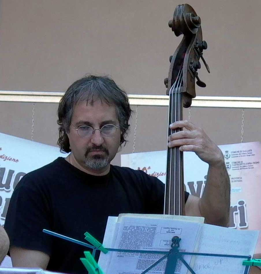 Enrico Fazio - Galliate Jazz Festival [April 2006]